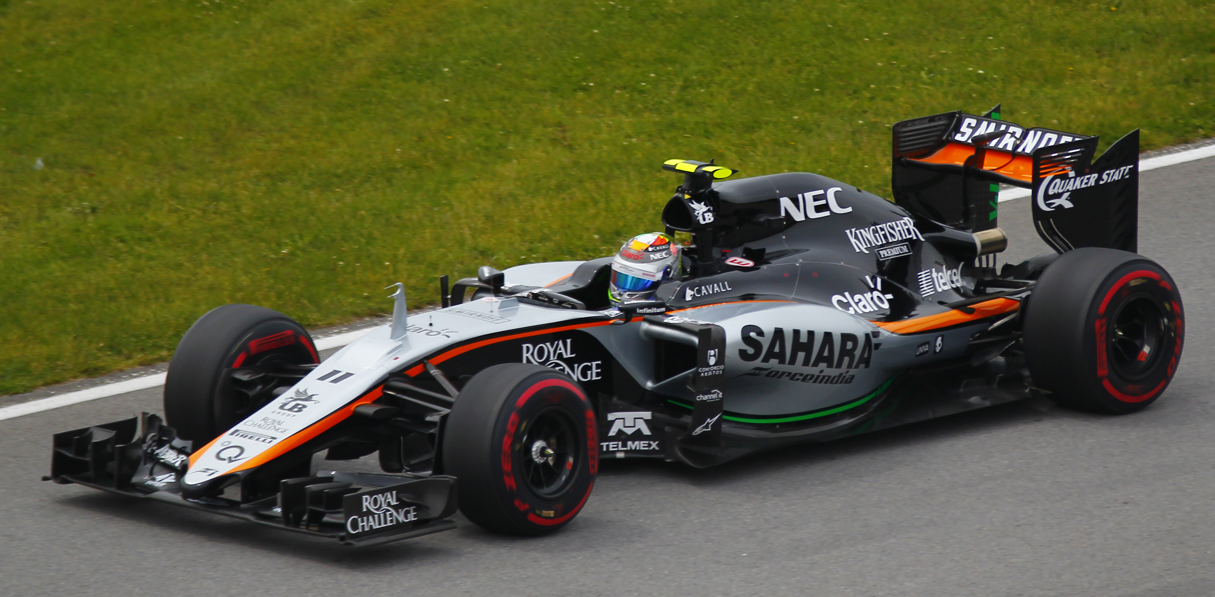 Sergio Pérez - Force India - Grand Prix du Canada - Circuit Gilles-Villeneuve - 7 juin 2015 (Photo Paul-Émile Poulin-Jacques)